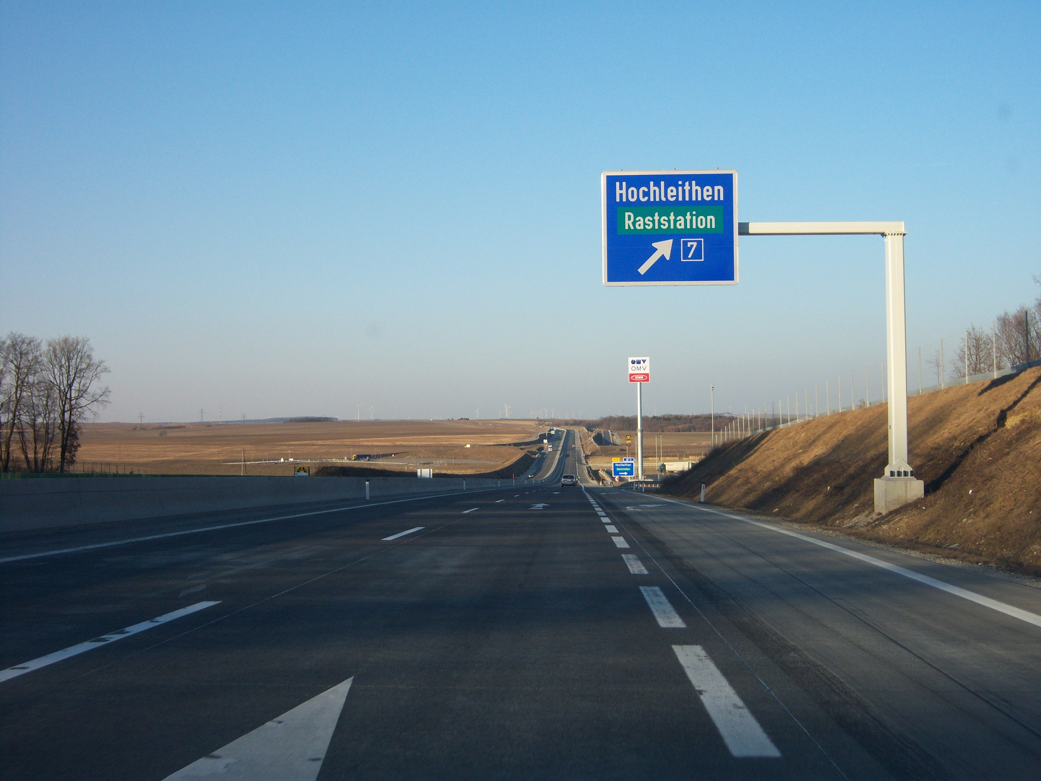 Nord Autobahn A5 Richtung Brünn an der Anschlussstelle Hochleithen.